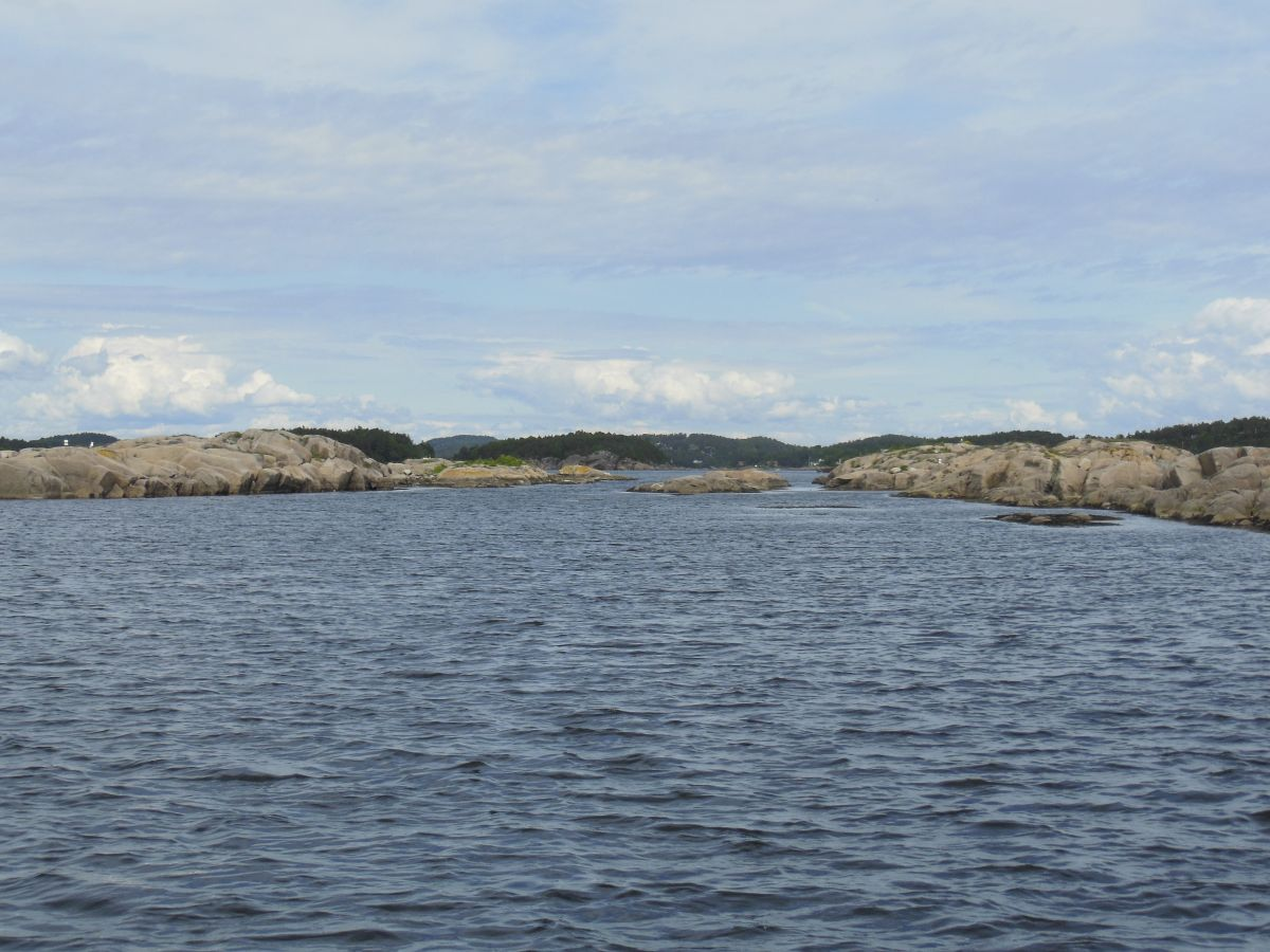 Kvitskjærene ligger på Tjøme-siden av Hudø og eies av Oslo kommune.